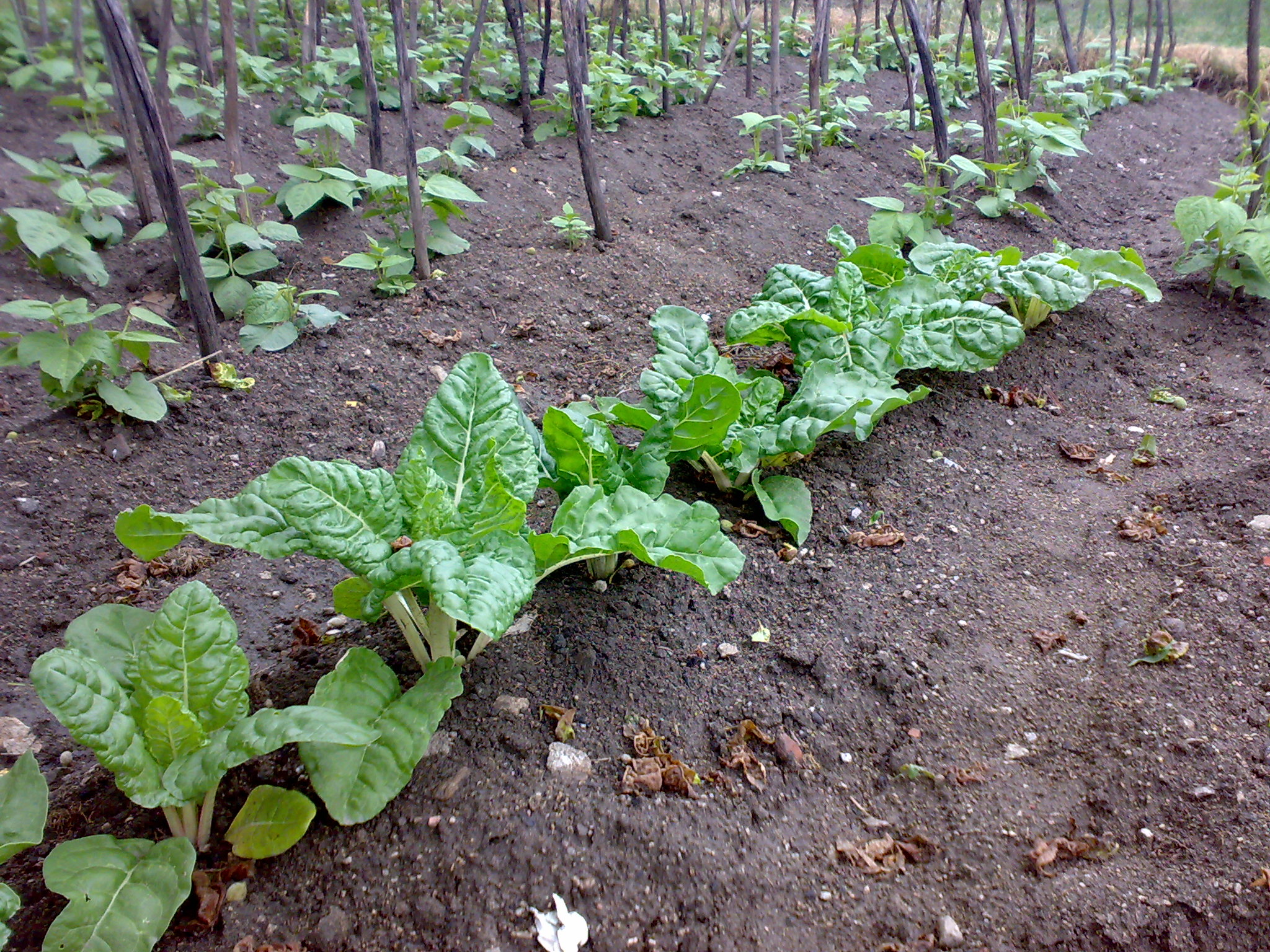 Plantas de acelgas y judías verdes en una huerta de Villafranca de la Sierra